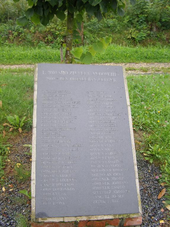 2001-ben készült tábla, amely az akkor élt orfalusi lakosok nevét tartalmazza, összesen 56-an (Vas megye)